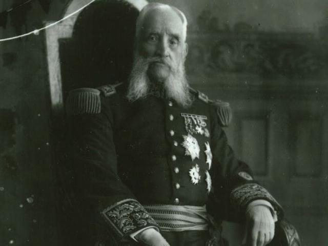 Andres Avelino Caceres (El Brujo de los Andes)